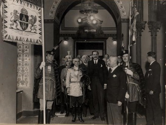 Borvendég Ferenc budapesti főpolgármester beiktatása 1934-ben. Középen ifj. Ugron Gábor volt belügyminiszter.